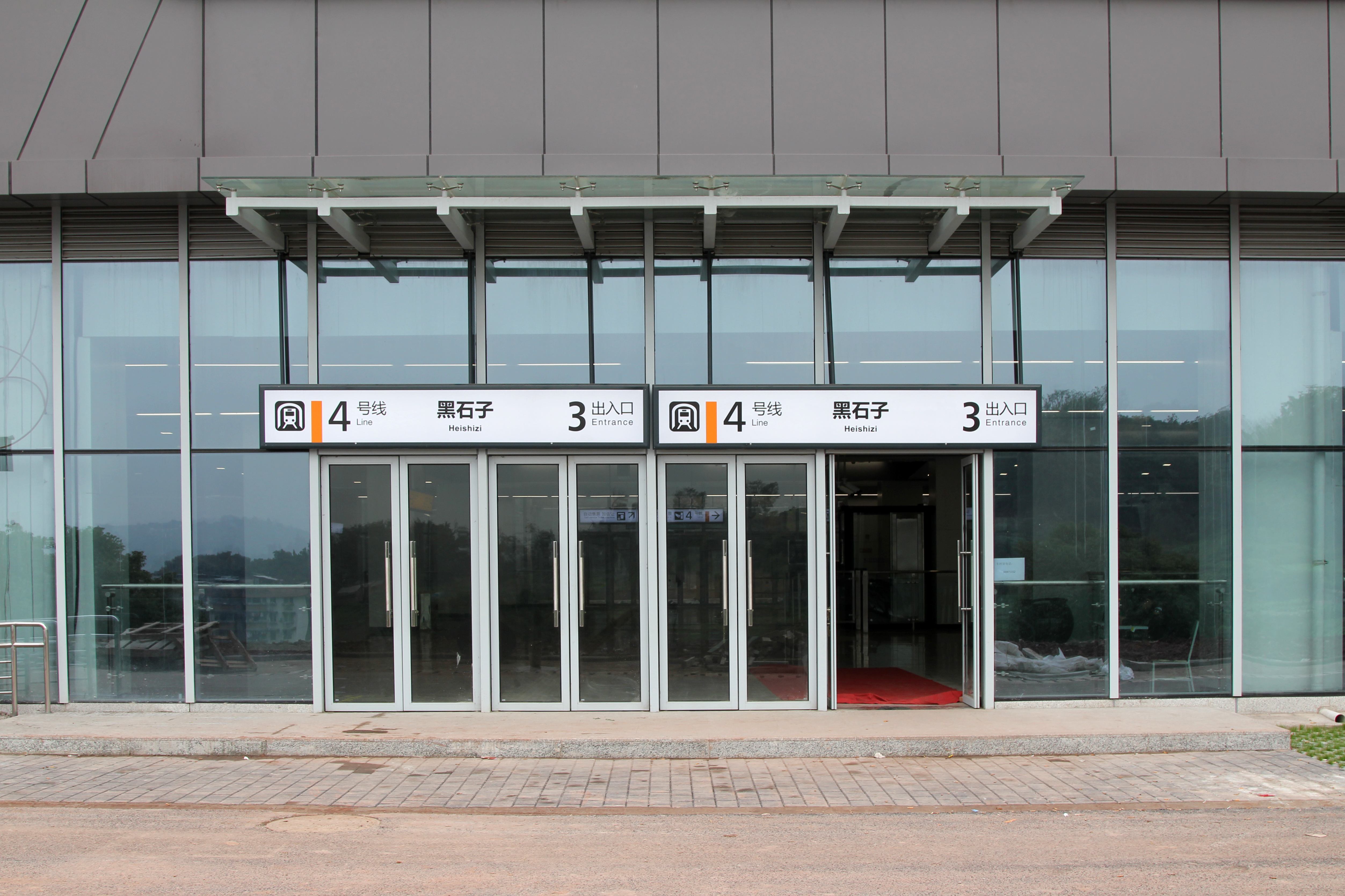 4号线黑石子站3出口